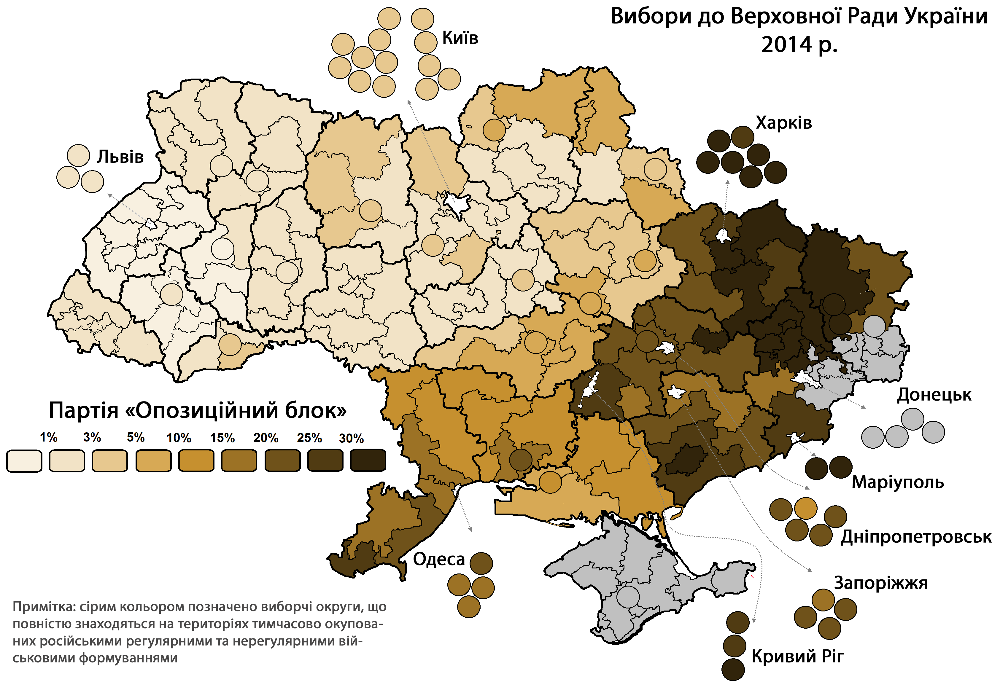 Вибори до Верховної Ради України. Кількість набраних голосів партією "Опозиційний блок" у відсотках за округами.